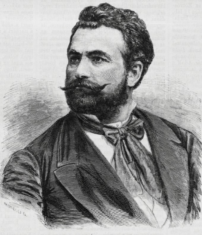 Huszár Adolf szobrászművész portréja. Morelli Gusztáv metszete